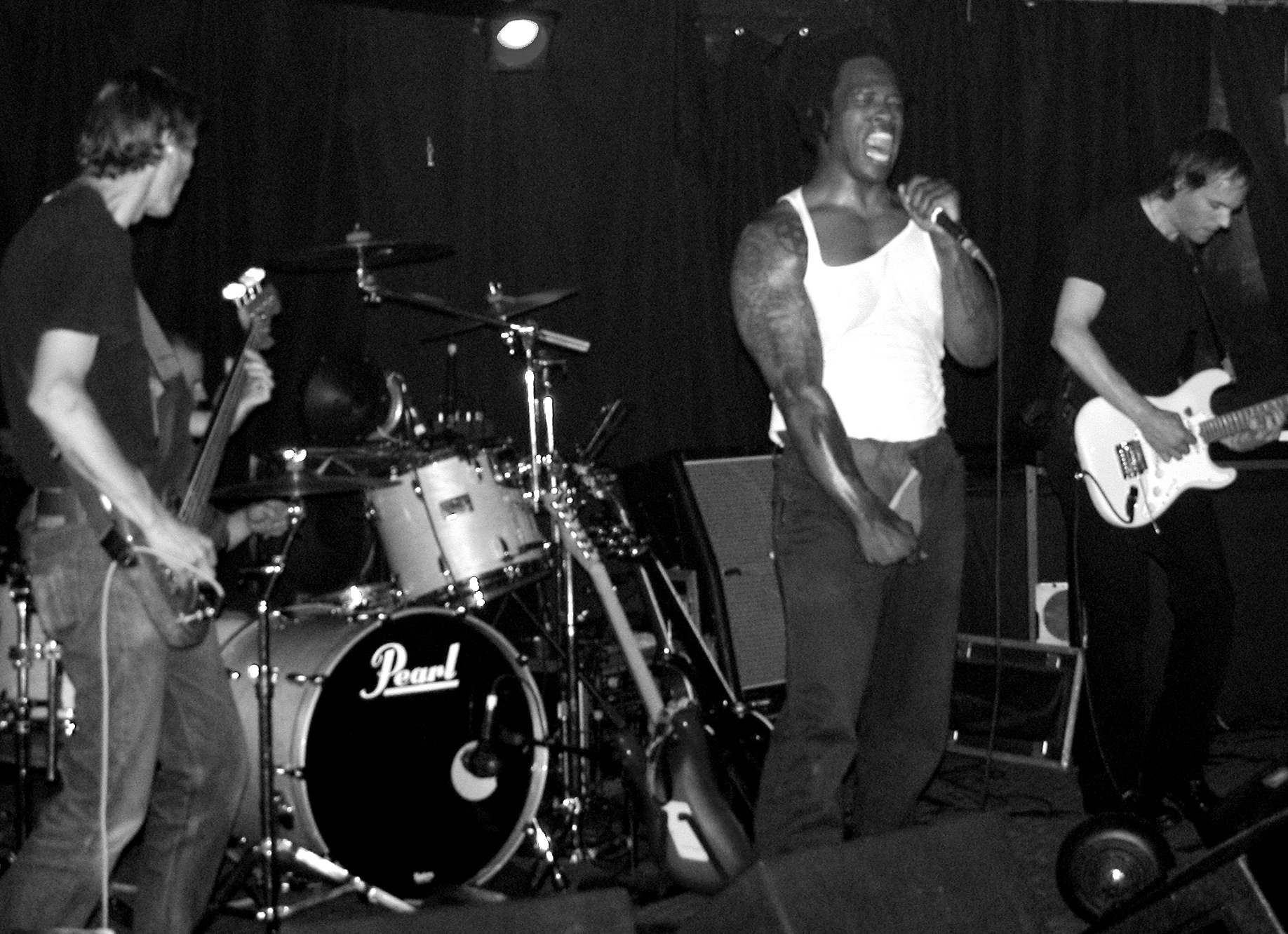 Oxbow